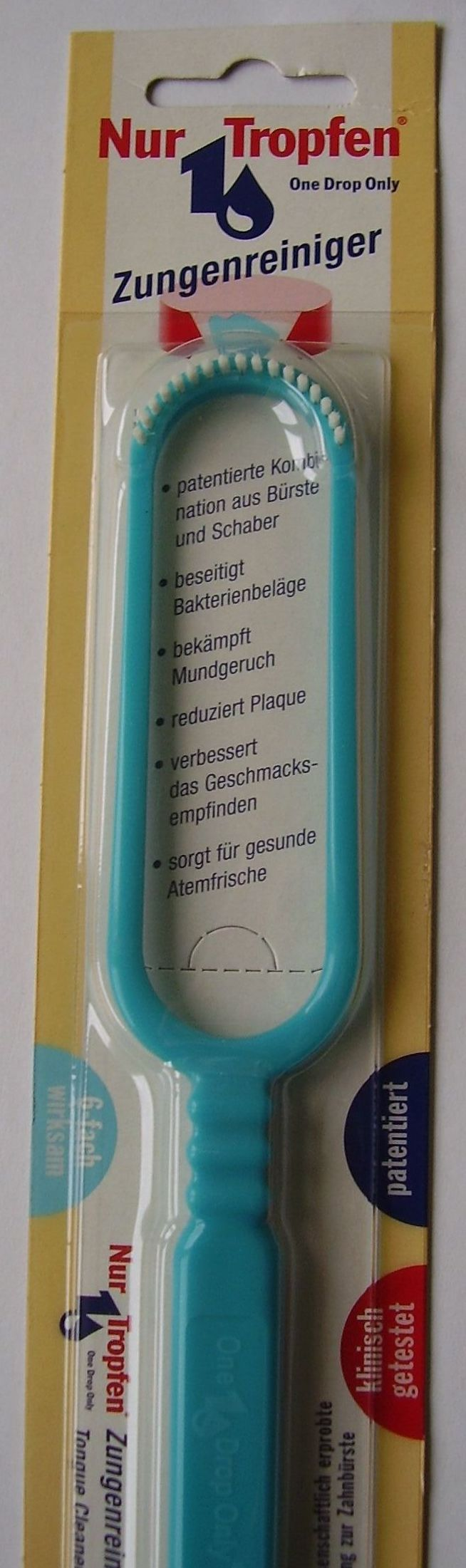 Zungenreiniger